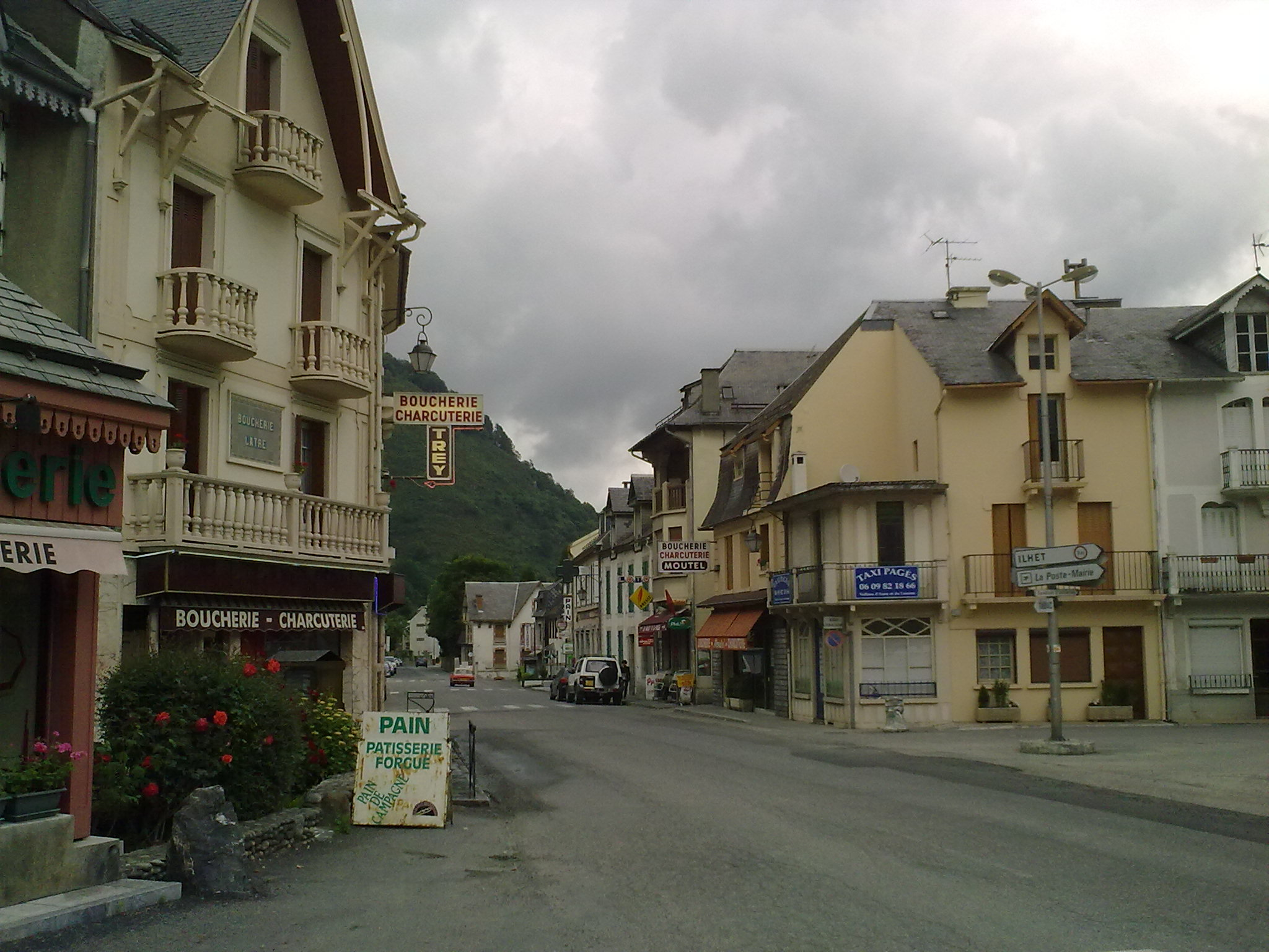 Sarrancolin